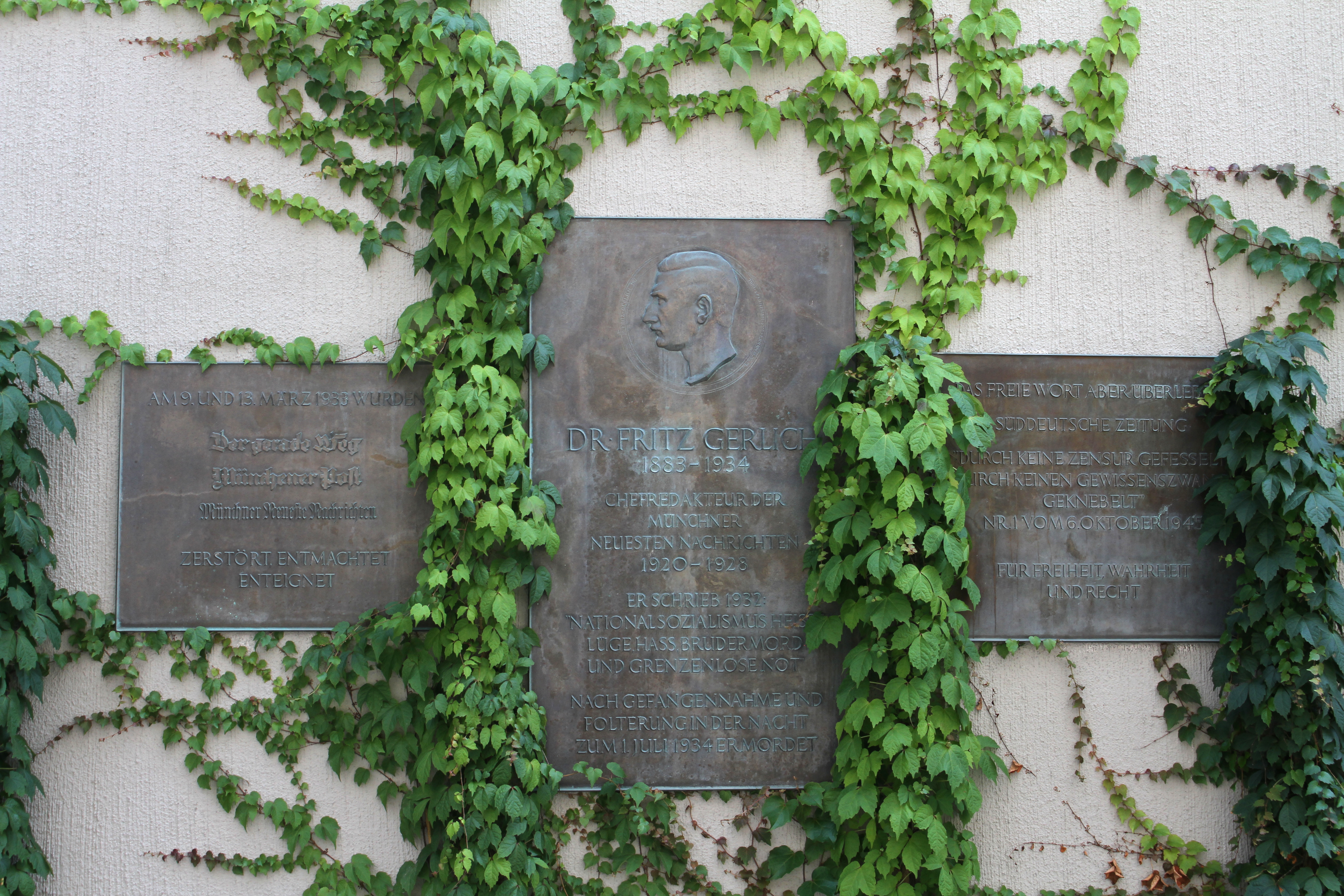 Hofstatt, München. Gedenkplatten für Fritz Gerlich, Journalist